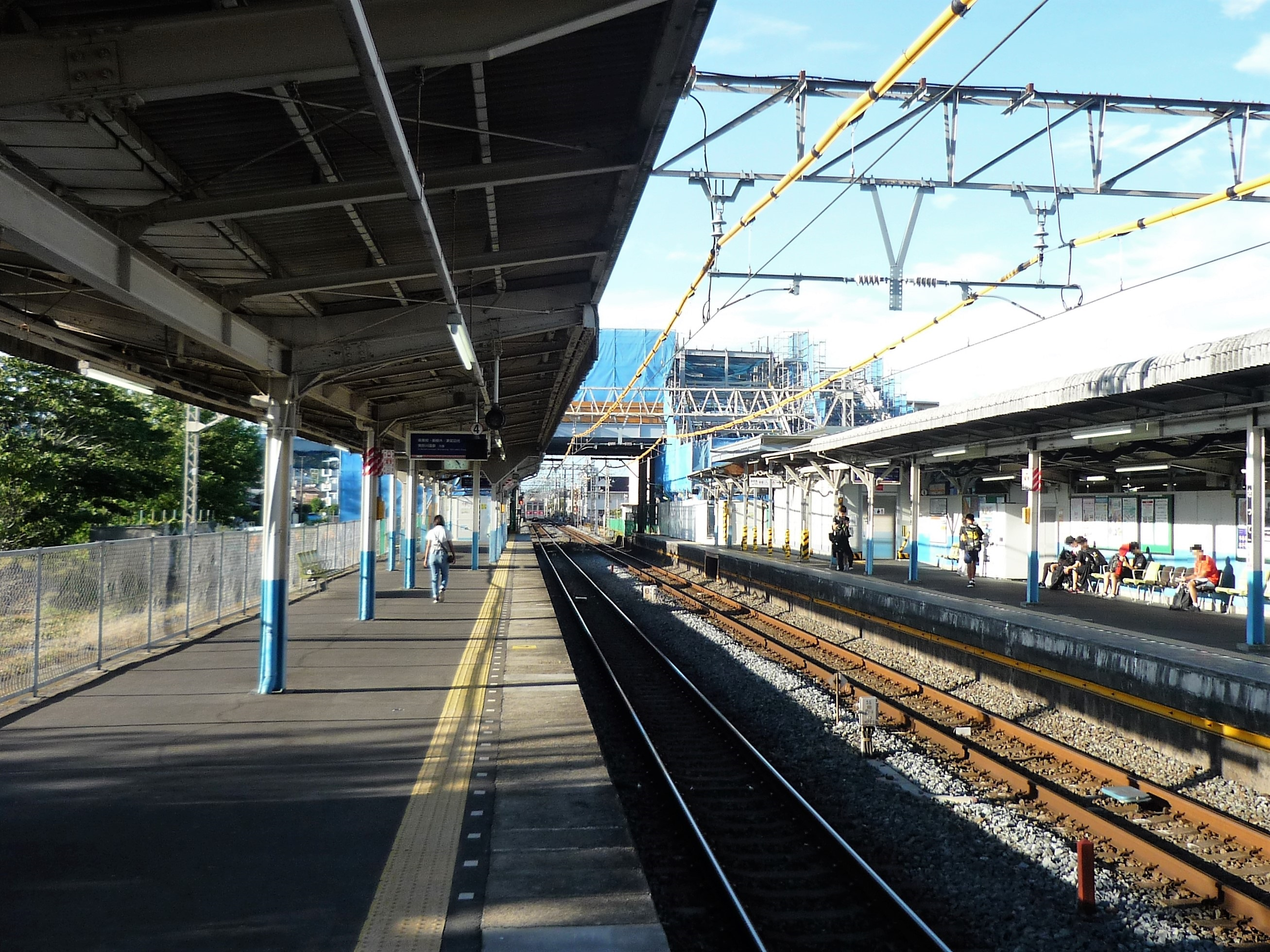 幸手駅ホーム（南栗橋駅方面を望む。左が2番線、右が1番線）奥は工事中の橋上駅舎 Panasonic Lumix DMC-FS3